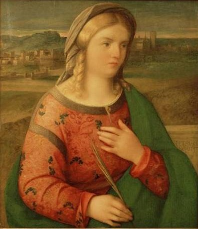 Retrato de dama ataviada como mártir